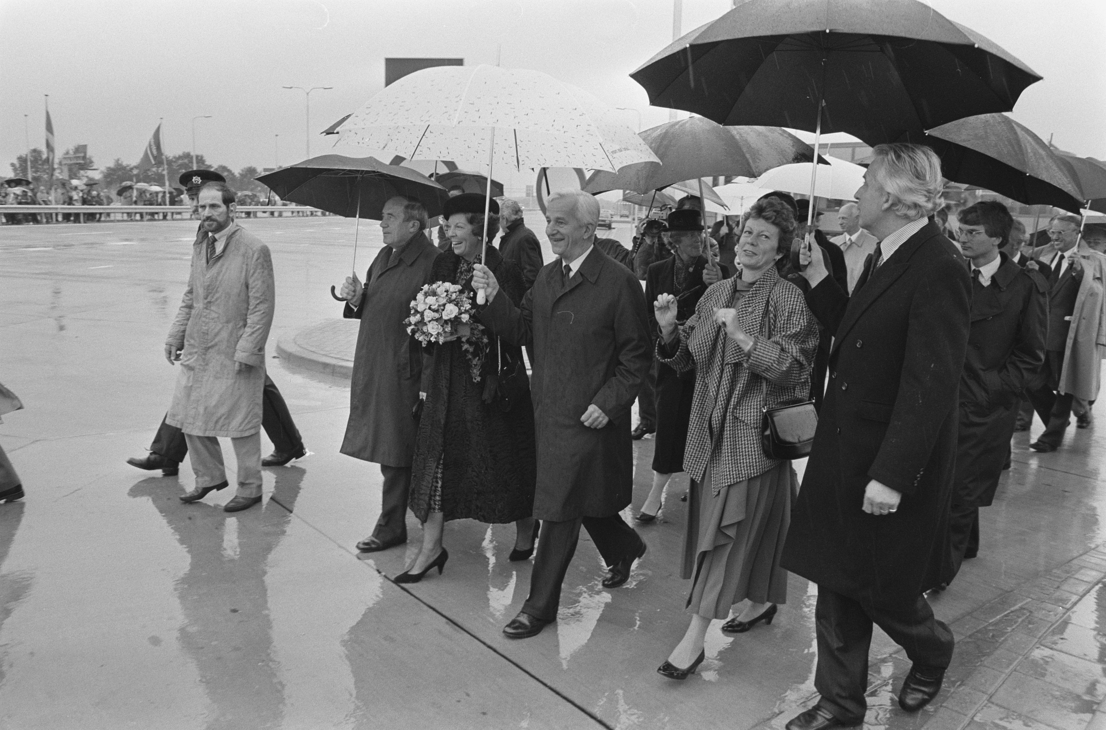 Collectie / Archief : Fotocollectie Anefo Reportage / Serie : [ onbekend ] Beschrijving : Officiele ingebruikstelling autoweg A73/A77 door Koningin Beatrix en president von Weizsacker ; links: Einert (bondsaangelegenheden) en rechts: Smit Kroes Datum : 22 oktober 1986 Trefwoorden : Ingebruikstellingen, autowegen, koninginnen Persoonsnaam : Beatrix, koningin, Smit-Kroes, Neelie, Weizsäcker, Richard von Fotograaf : Croes, Rob C. / Anefo Auteursrechthebbende : Nationaal Archief Materiaalsoort : Negatief (zwart/wit) Nummer archiefinventaris : bekijk toegang 2.24.01.05 Bestanddeelnummer : 933-7936